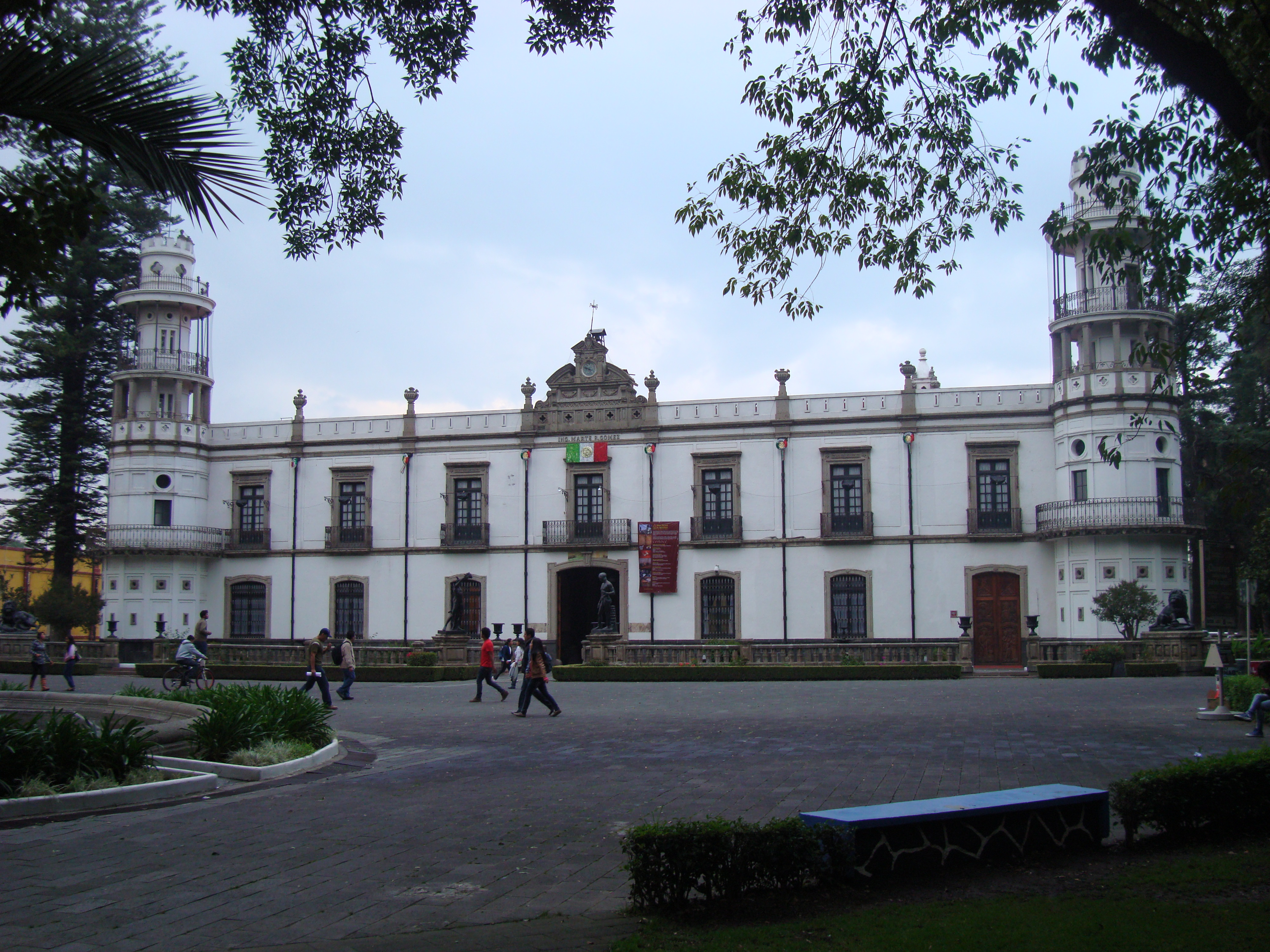 Vista frontal de rectoria.